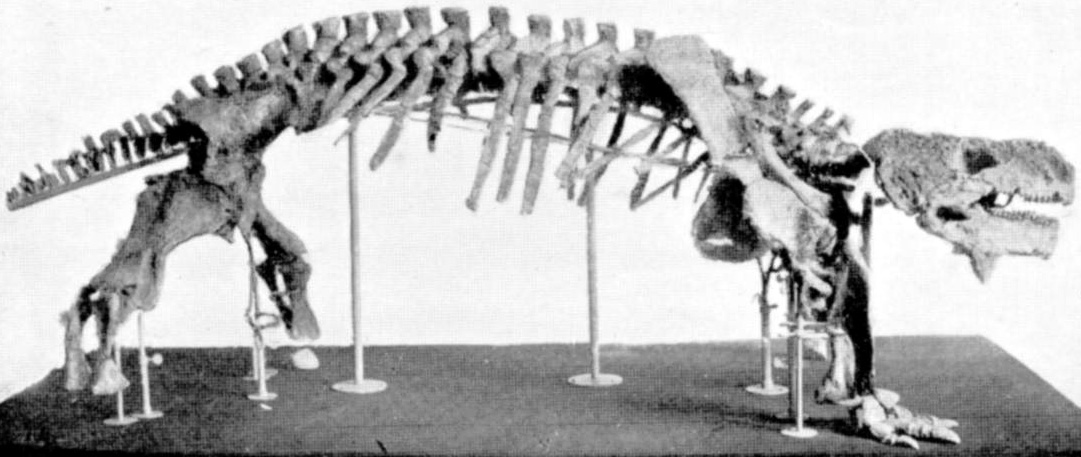 Scutosaurus (Pareiasaurus) karpinskii skeleton.